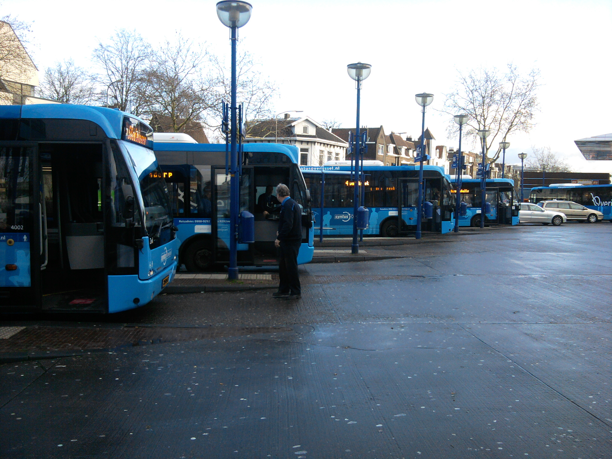 Busstation Zwolle stad